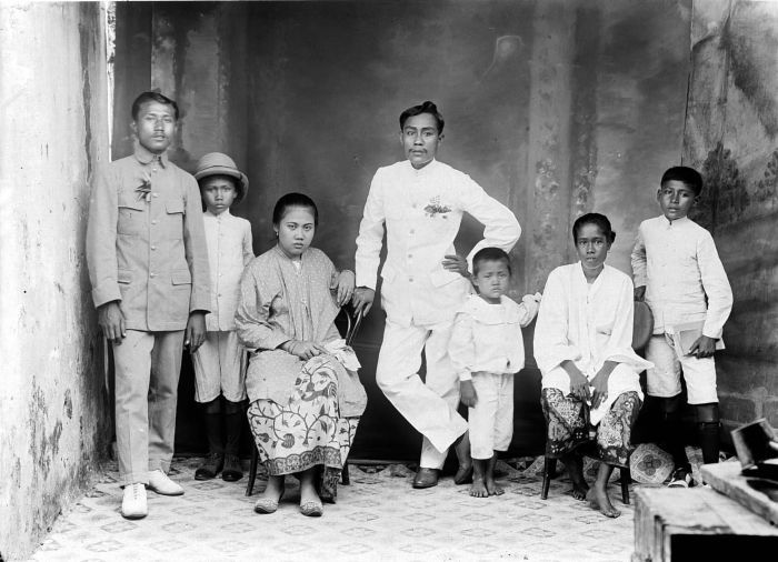 Negatif. Staf Mesin Perusahaan Timah Singkep dengan keluarga mereka, Riouw (sekarang Riau).